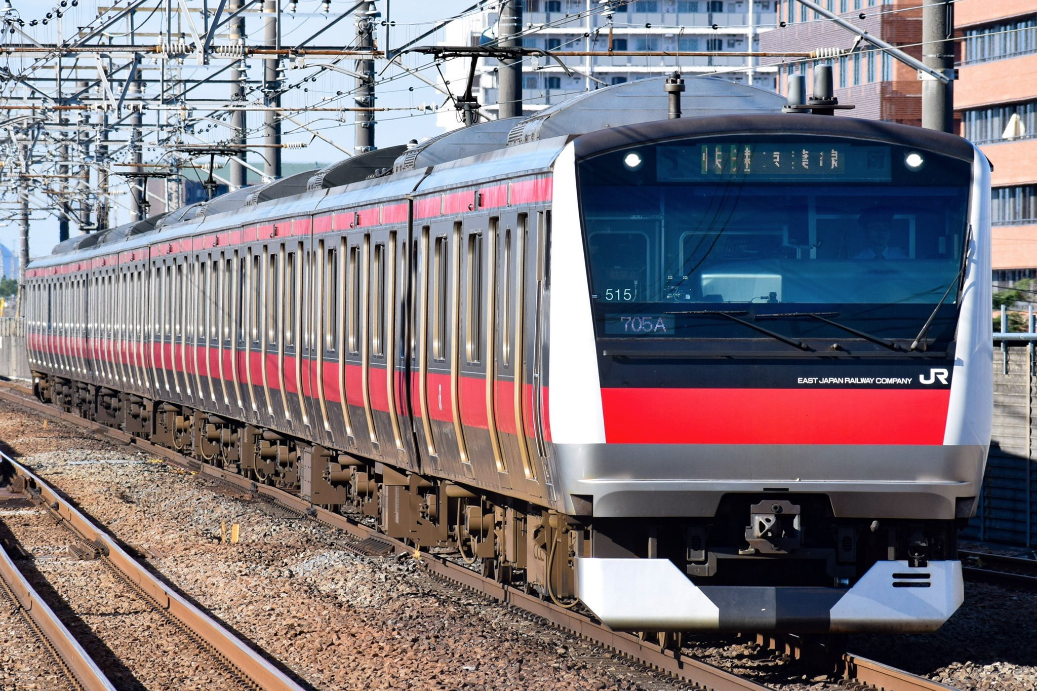 京葉線を走るE233系5000番台ケヨ515編成(快速蘇我)